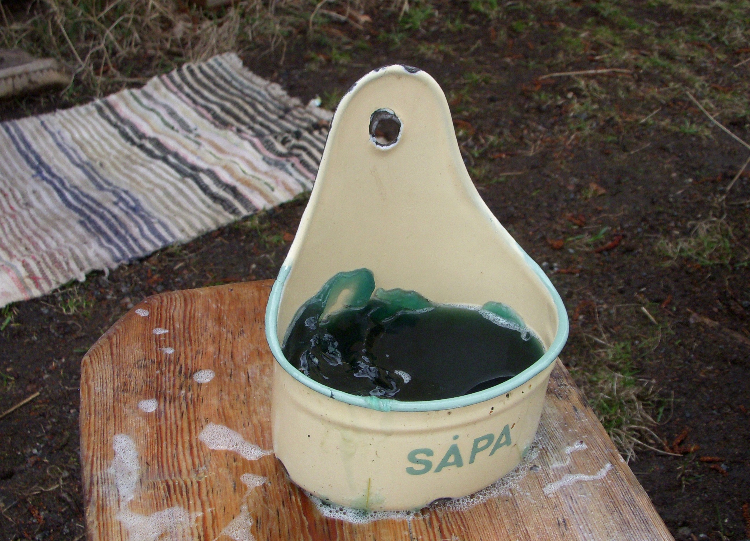 Hagalunds Tvätterimuseum i Huddinge, vår-byken